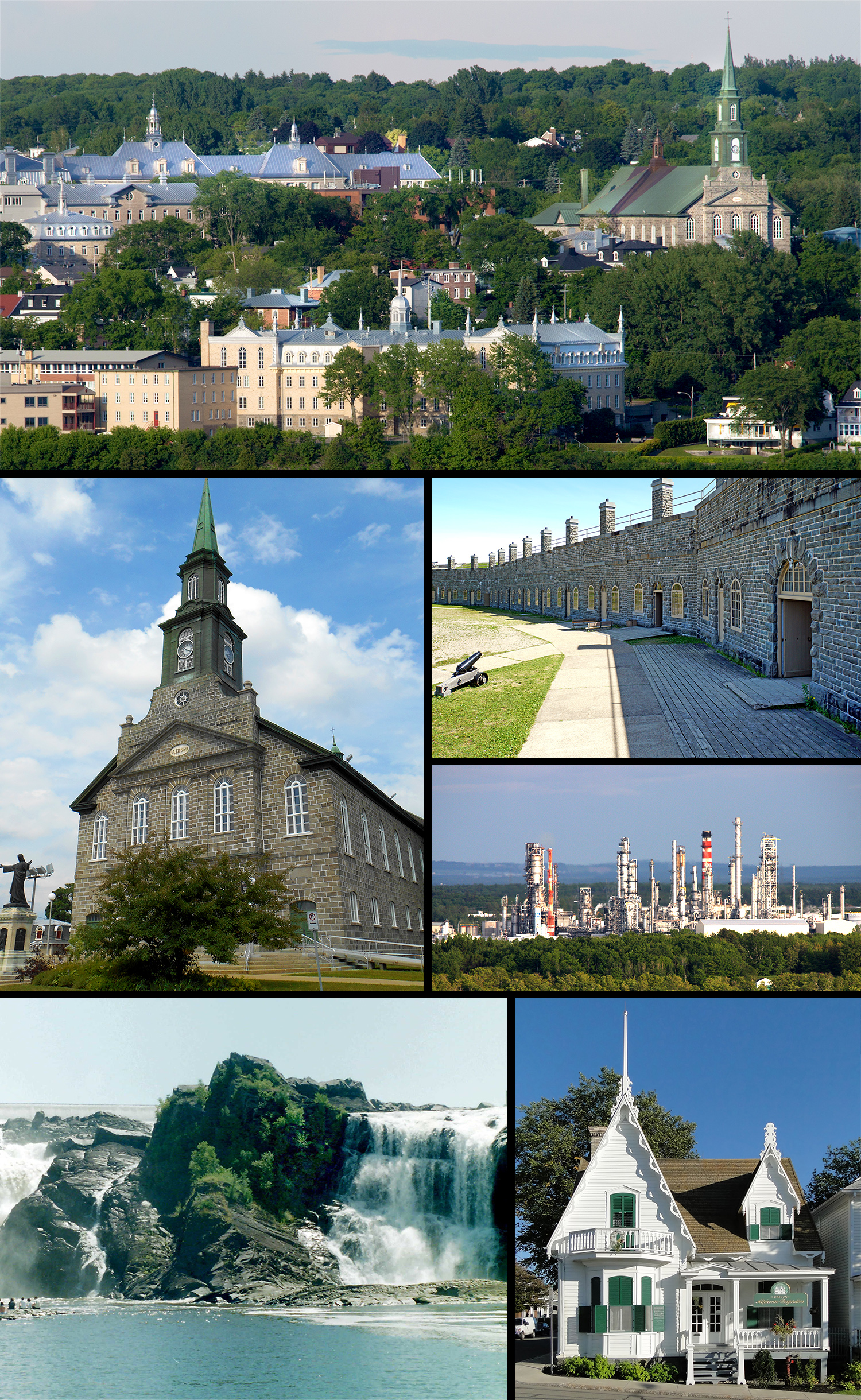 Montage réalisé avec